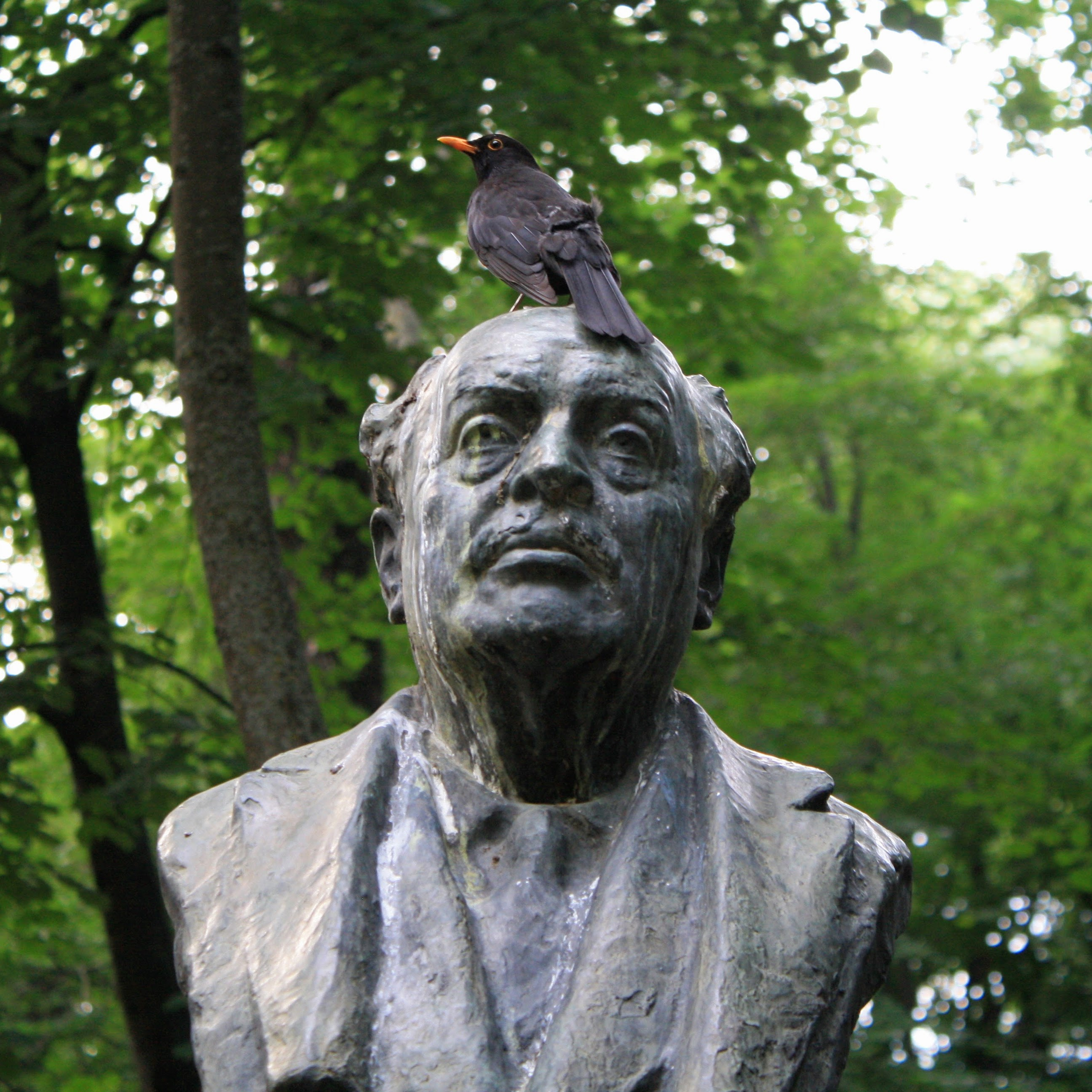 Bustul lui Emanoil Panaiteanu-Bardasare din Parcul Copou, Iași